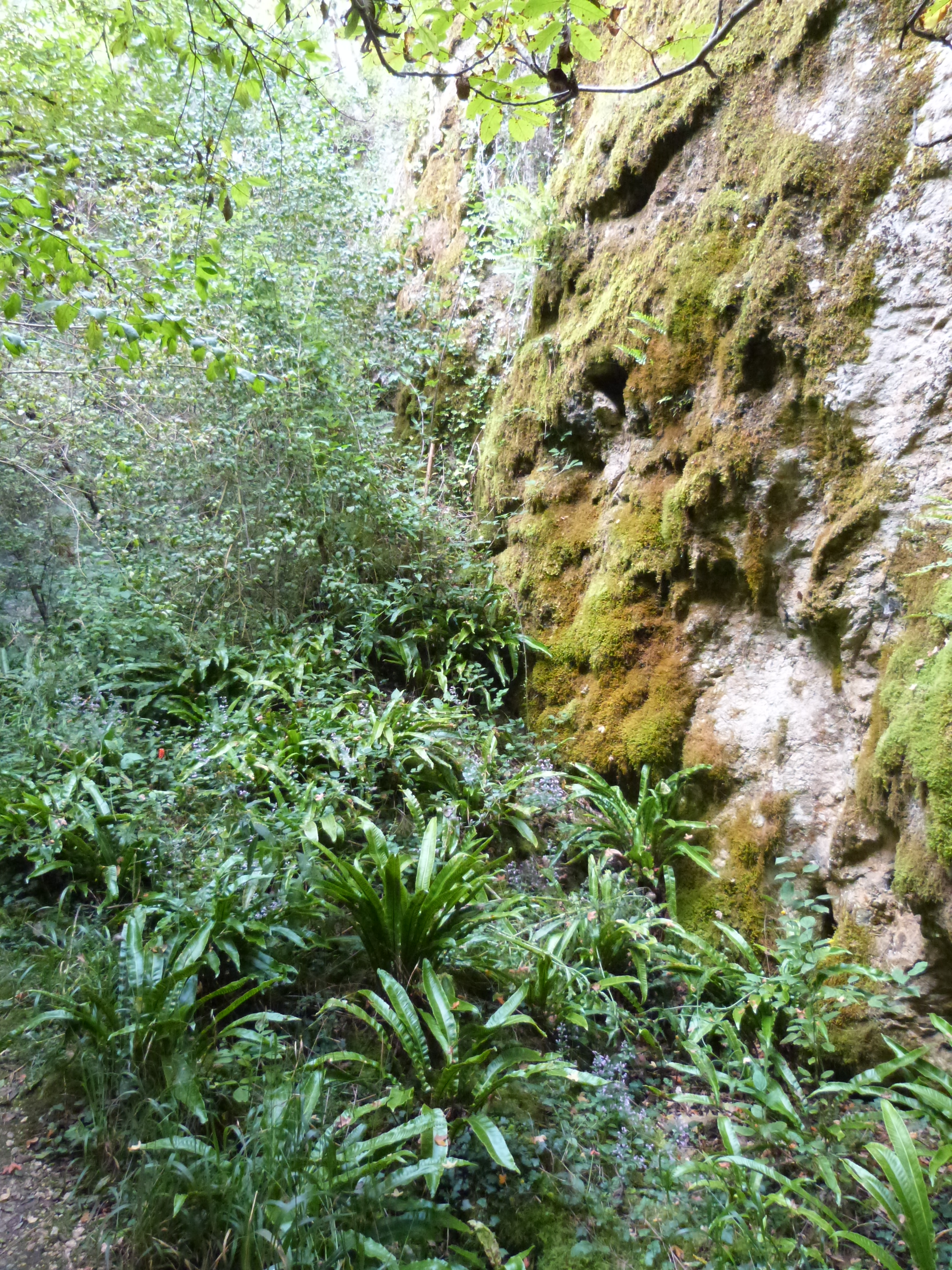 Phosphatière du Cloup d'Aural (Inscrit) .